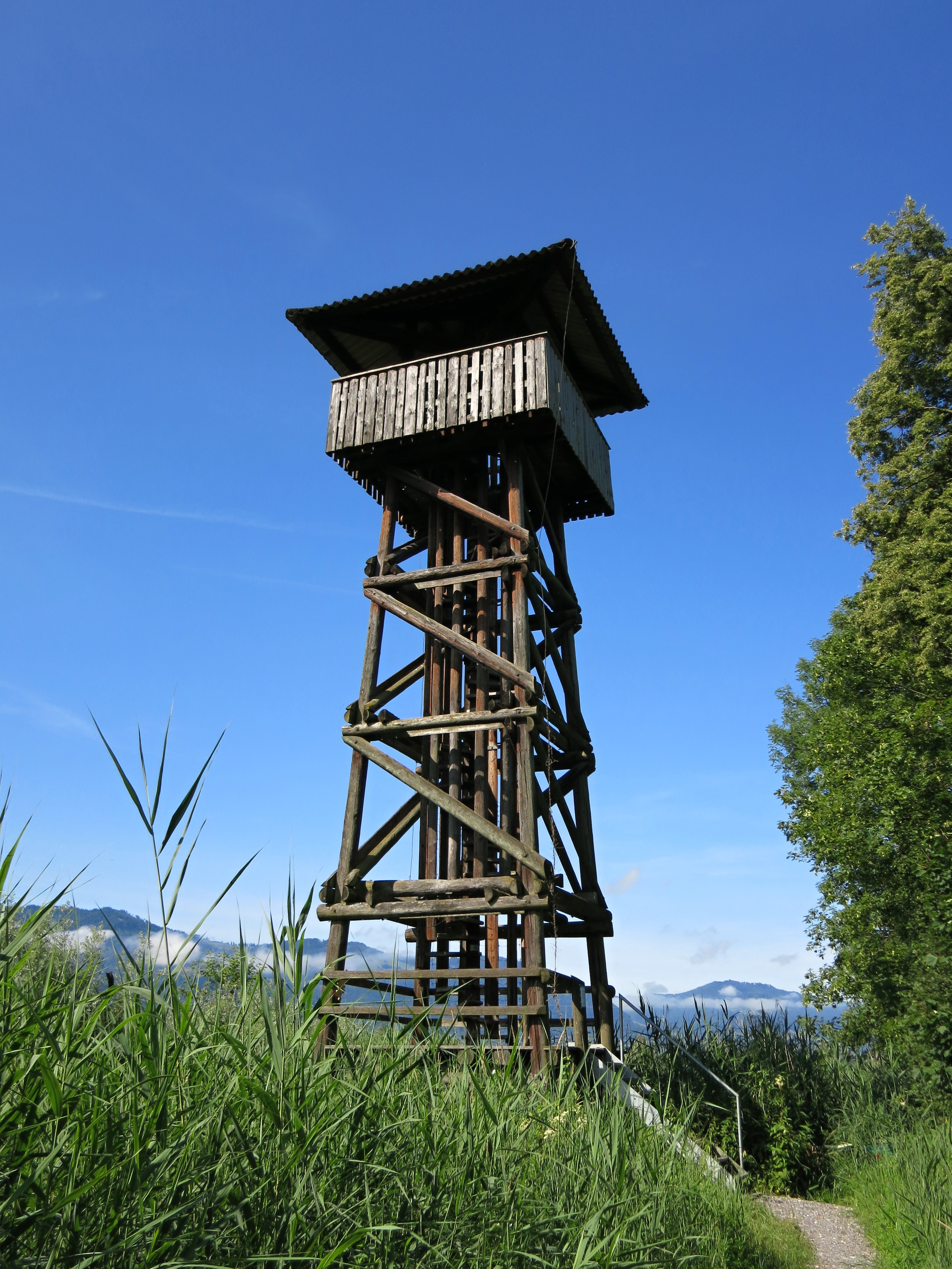 Kaltbrunner Ried Turm gross